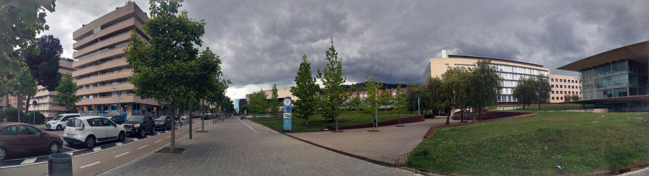 سراسر‌نمای دانشگاه UPC در خیابان جوردی گیرونا